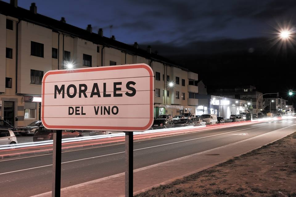 Panel indicador de entrada a la localidad.